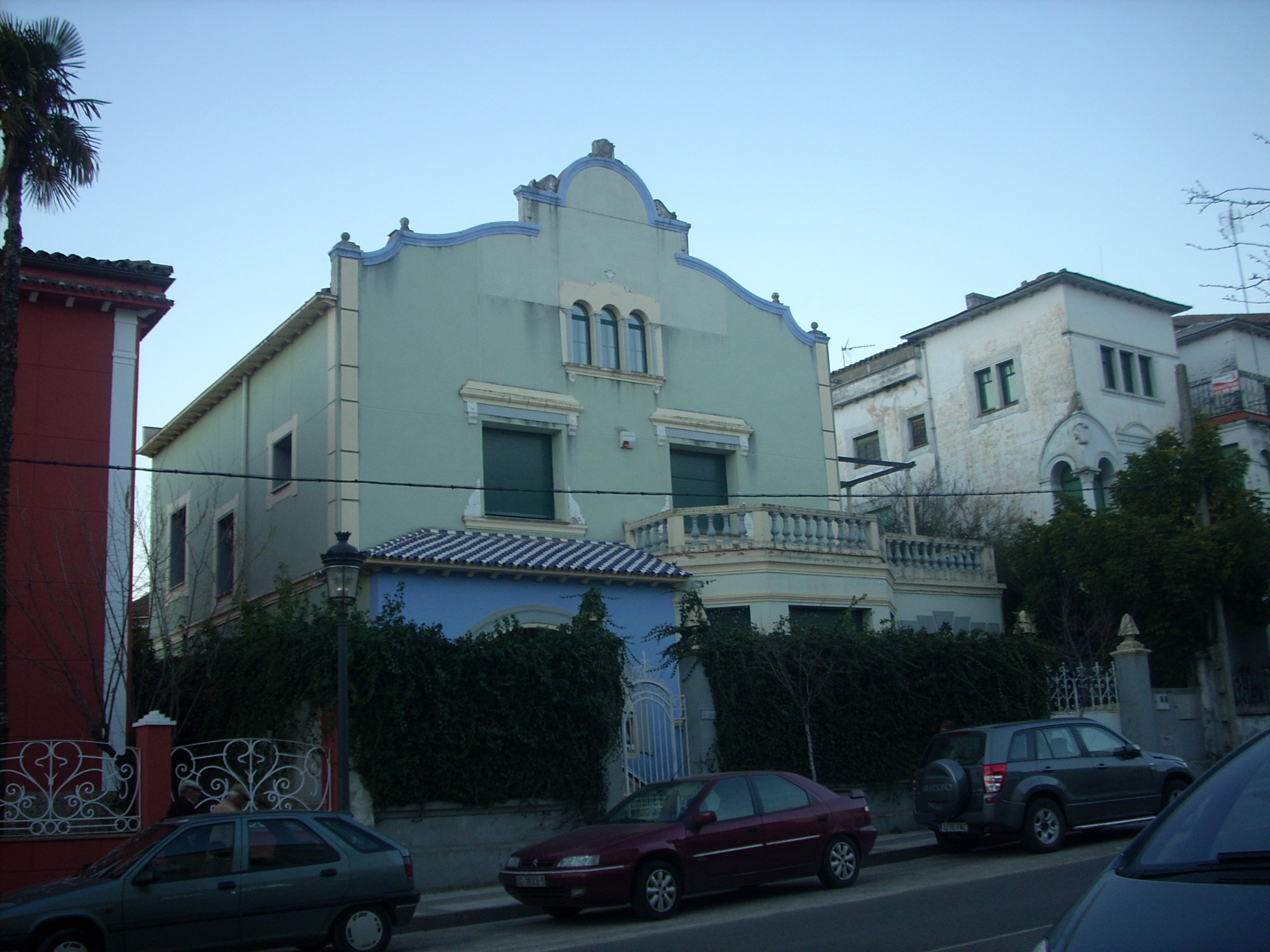 Fachada Principal del Edificio "Villa Guadalupe", que alberga el Instituto Histórico Hoffmeyer.